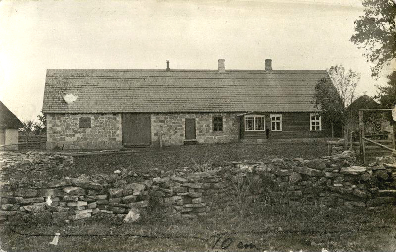 Хутор Ууэ-Яани в деревне Ура, волость Коонга, Эстония. 1911 год.